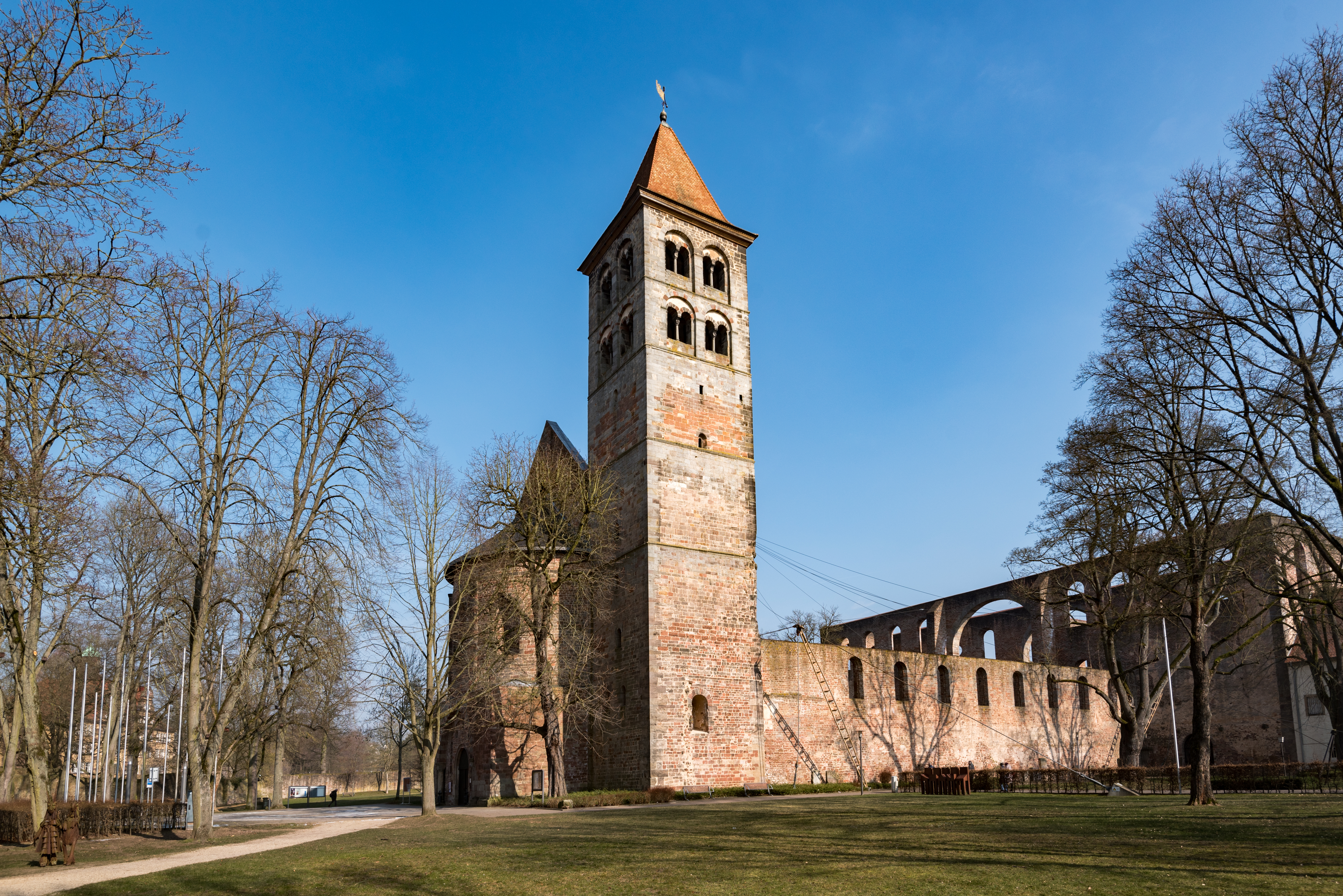 Bad Hersfeld, Im Stift, Stifsruine